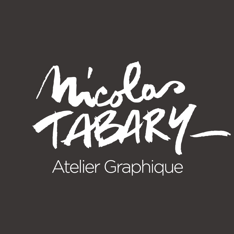 LOGO NicolasTABARY Atelier Graphique